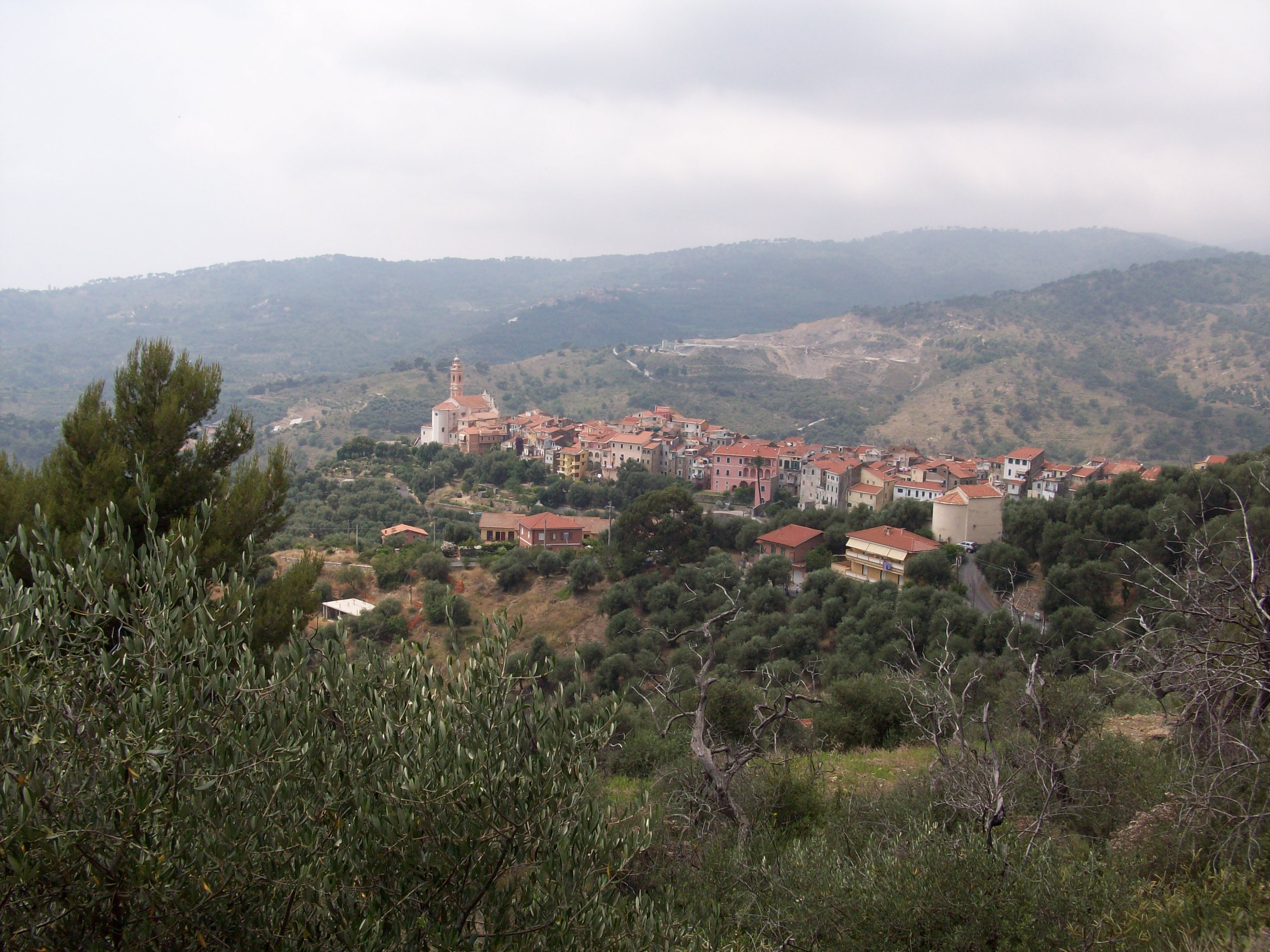 Blick von der Bergstraße Richtung Dolcedo oberhalb Civezza zurück auf den Ort